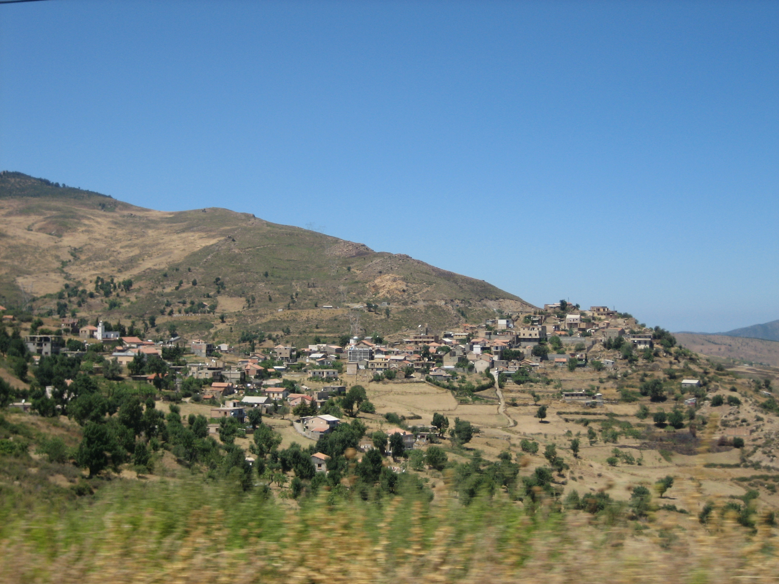 Paysage de Kabylie (wilaya de Sétif) (Algérie)/ Landscape of Kabylie (wilaya of Setif) (Algeria)